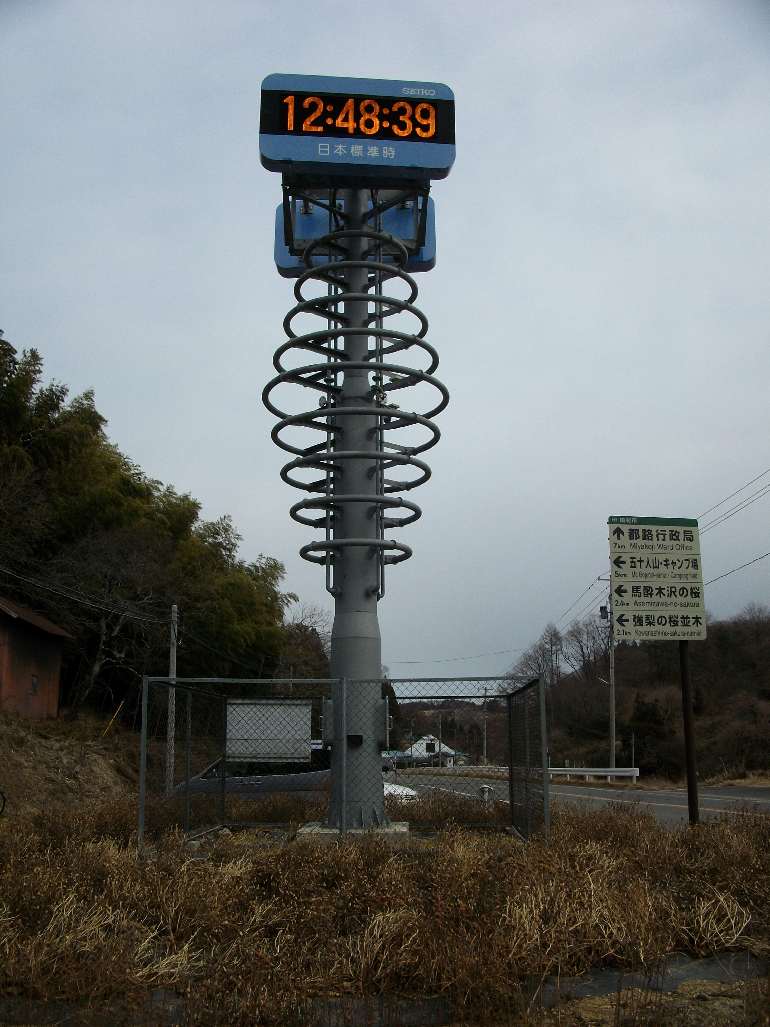 福島県田村市都路町岩井沢 国道288号下り線側 旧・都路村時代に設置された、おおたかどや山標準電波送信所設置記念モニュメントを 郡山起点側から撮影